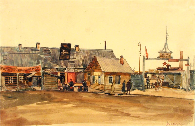 Фогелер Г. Заводы № 37-38 в Сороке. 1933 -1934 гг.